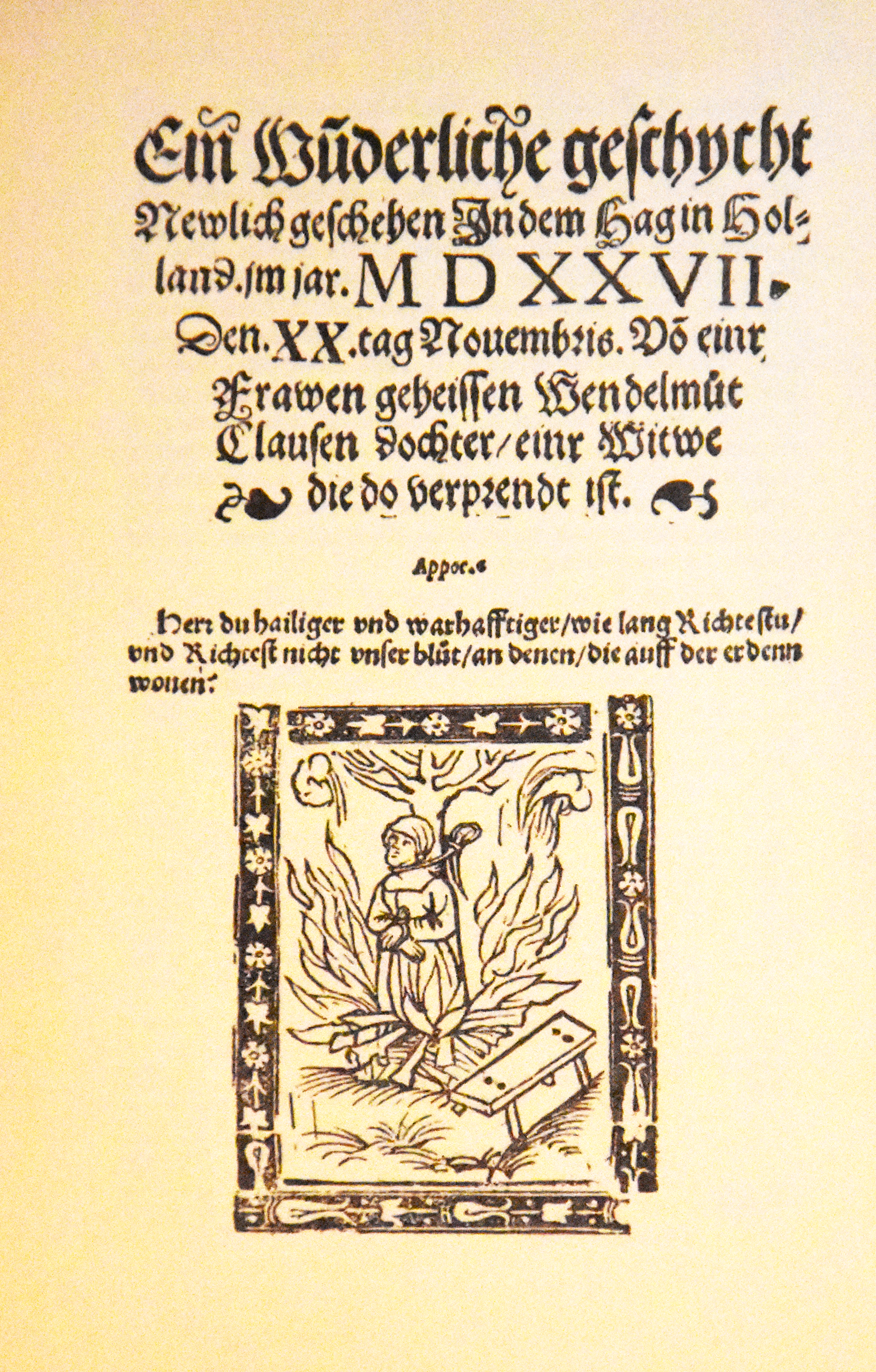 Titelblad van het relaas van de verbranding van Wendelmoet Claesdochter in 1527 in Den Haag